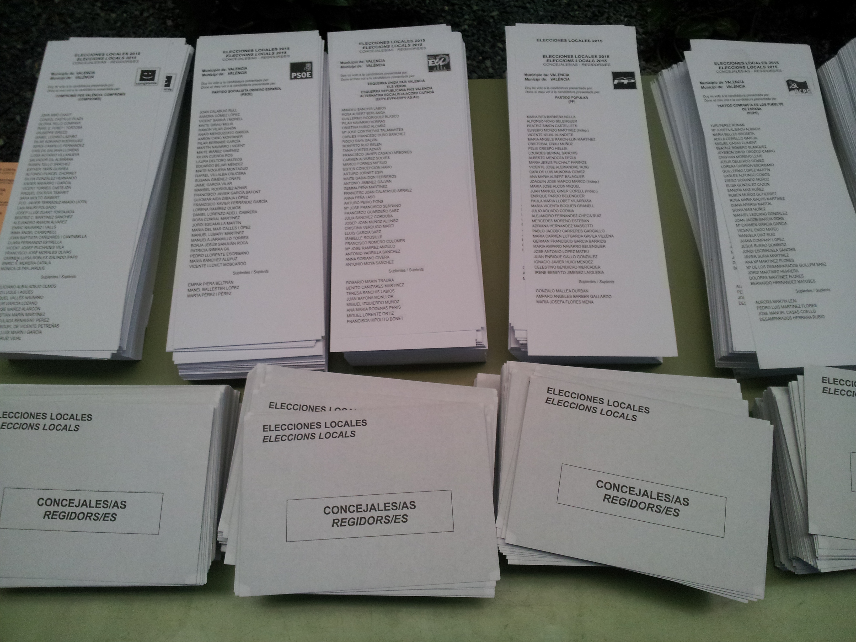 Urnes de les eleccions municipals i a Corts Valencianes de 2015